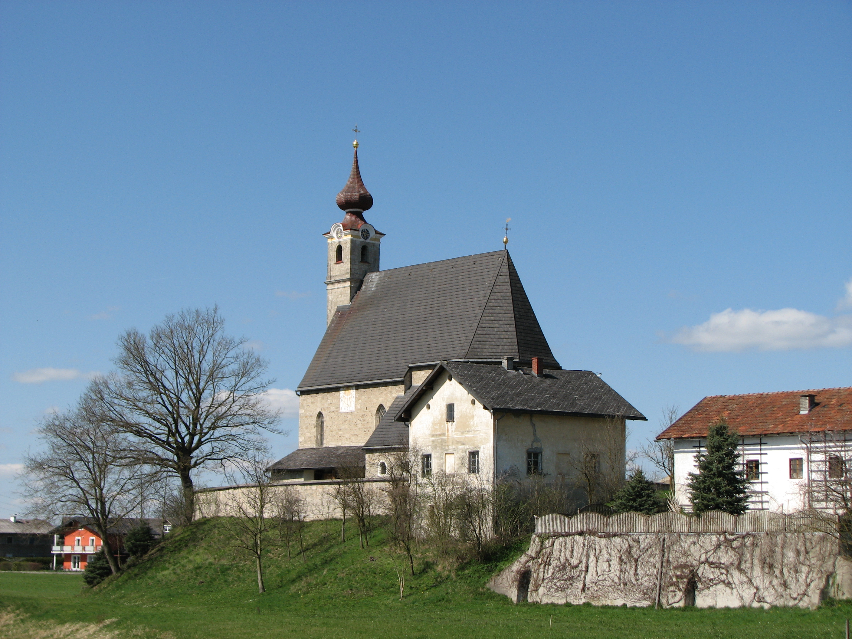 Kath. Filialkirche hl. Emeran, rechts das Mesnerhaus.